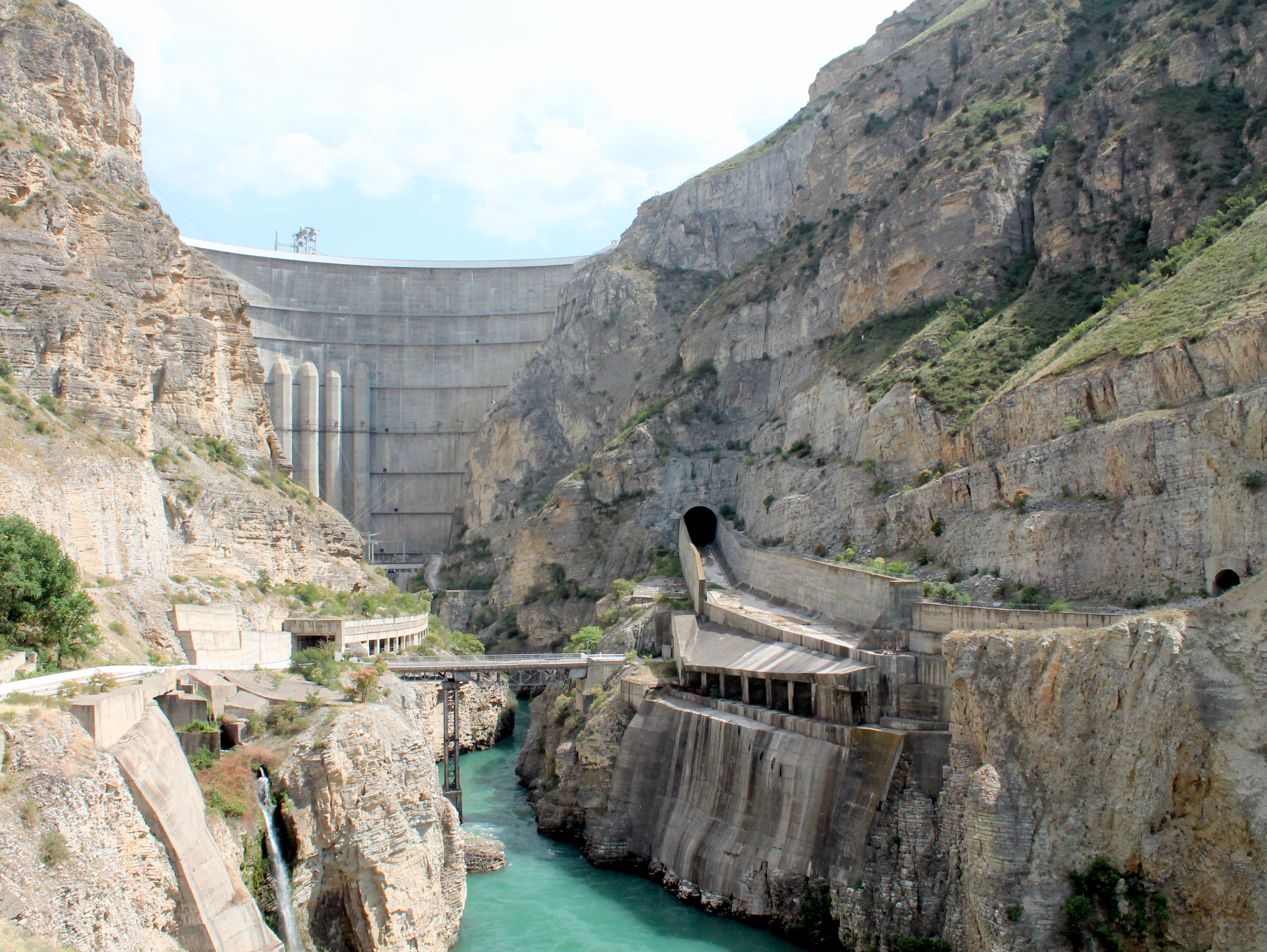 Чиркейская ГЭС